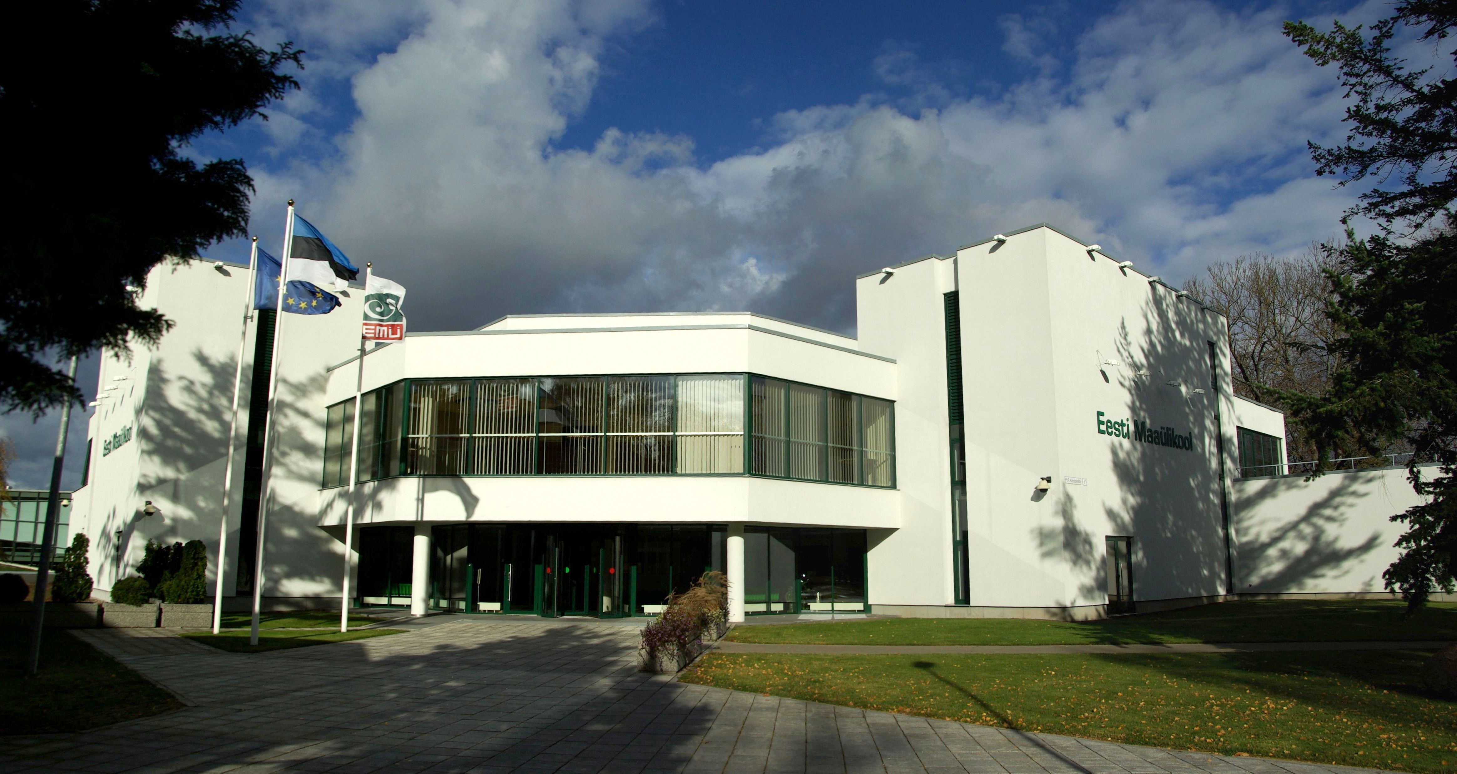 asub Tartus Kreutzwaldi 1a